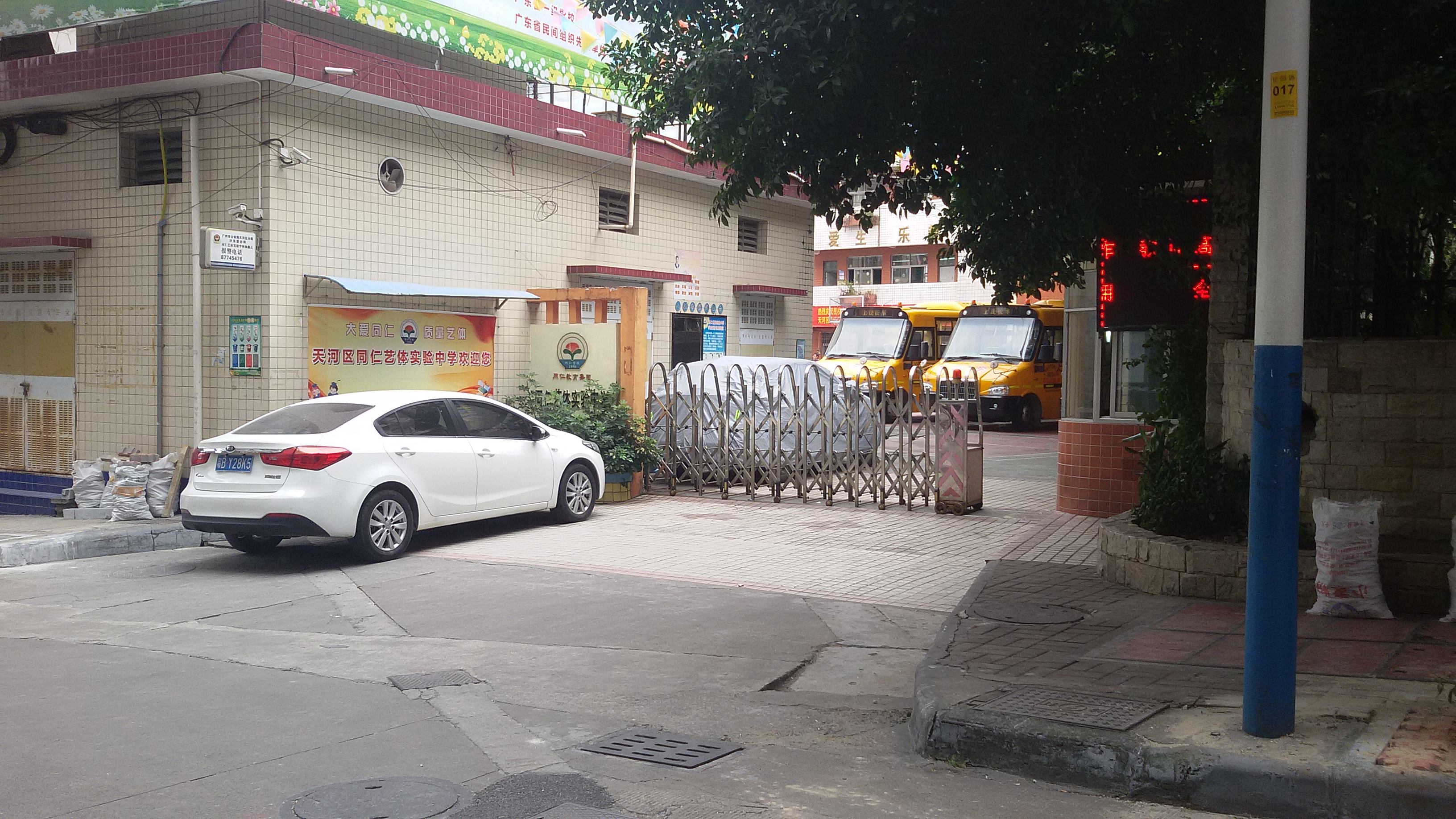 粵語: 同仁藝體實驗中學